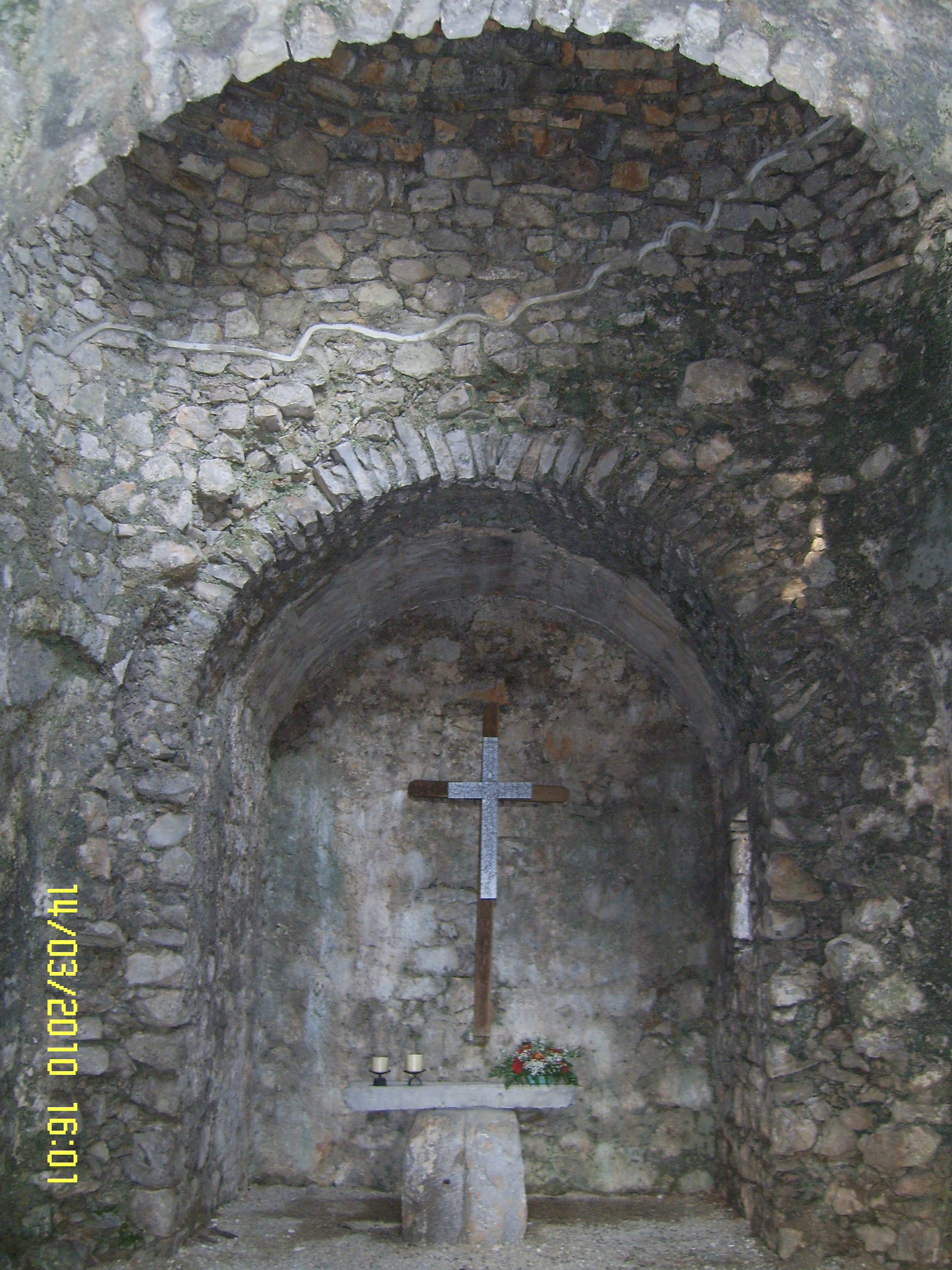 starohrvatska arhitektura, crkvica sveti Dunat kraj Punta na otoku Krku, unutrašnjost, 9. st.